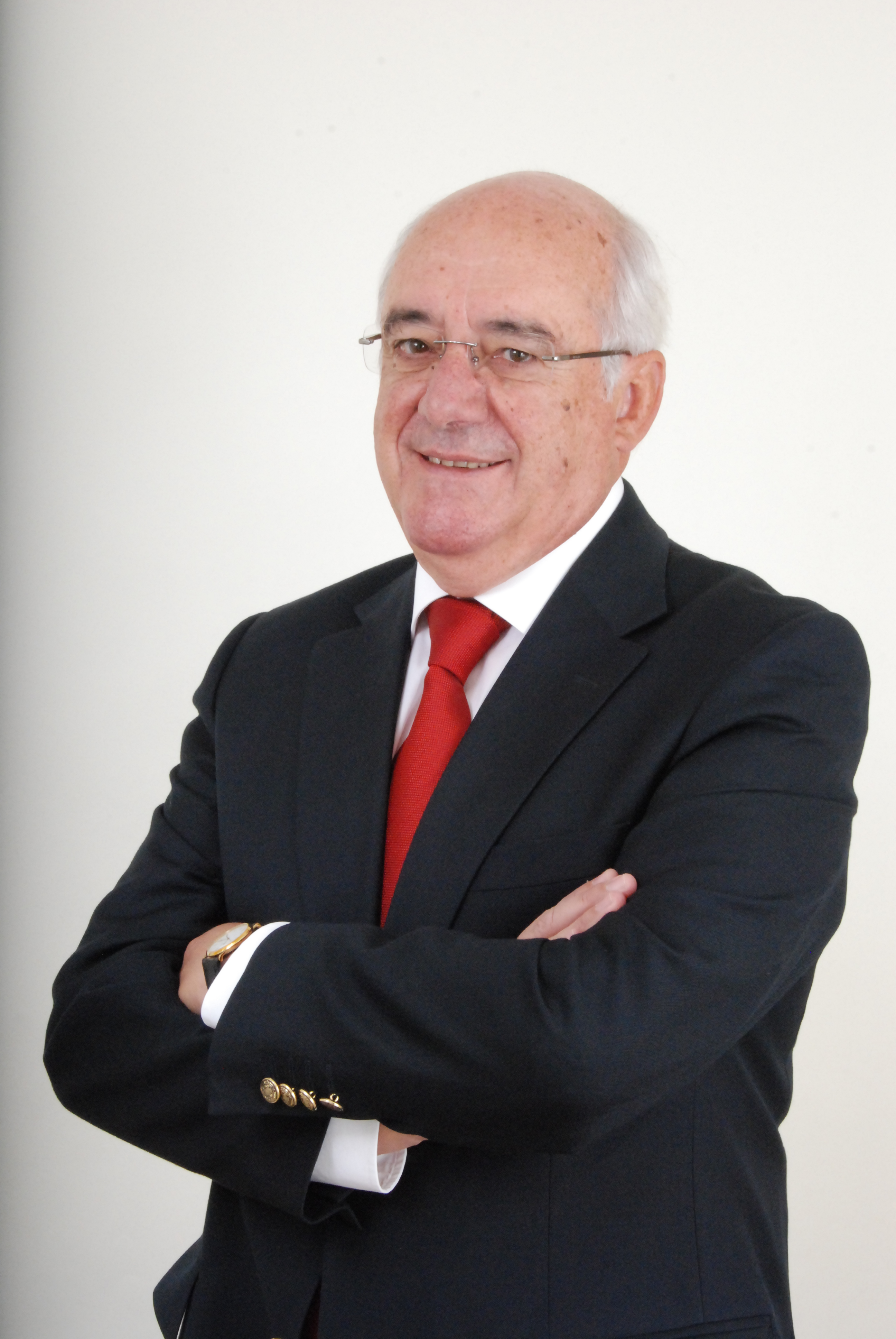 Portugal